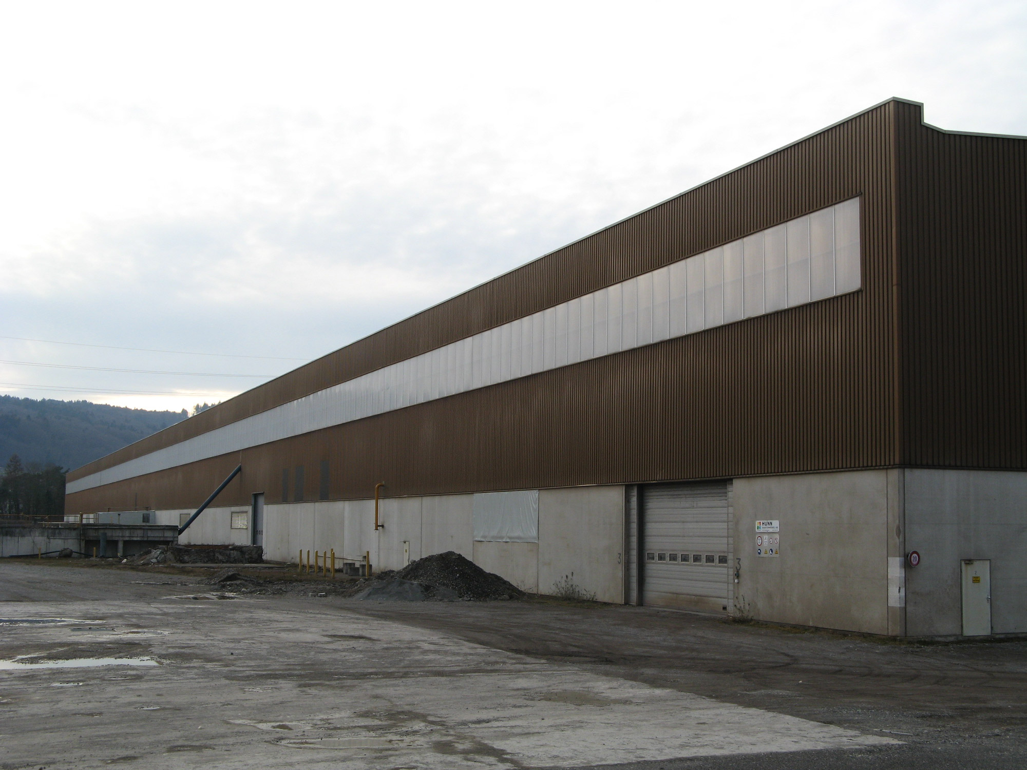 Zweite Fabrikhalle des ehemaligen Eisenwerks Ferrowohlen in Wohlen